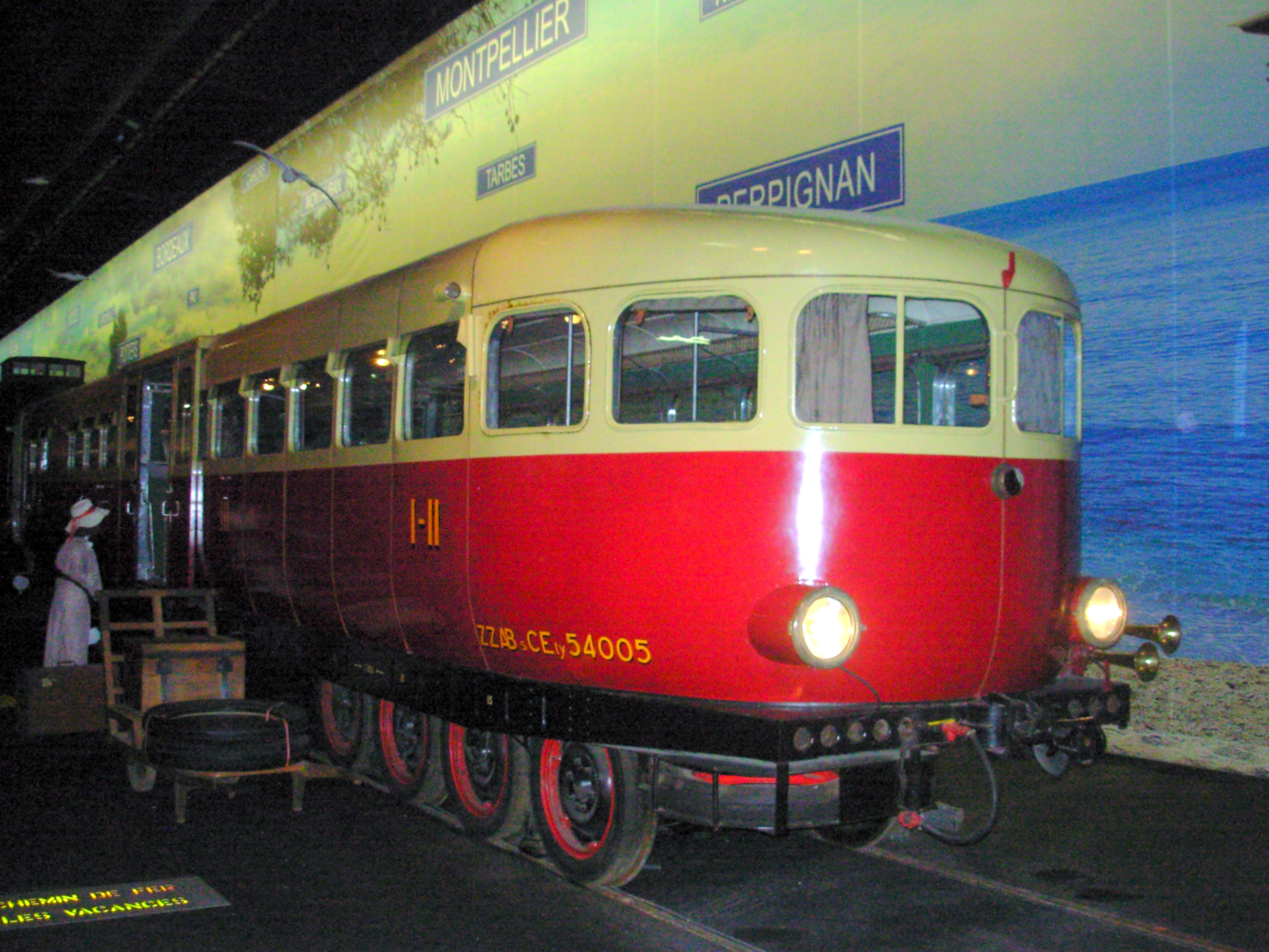 Micheline XM - 5005 EST - 1936